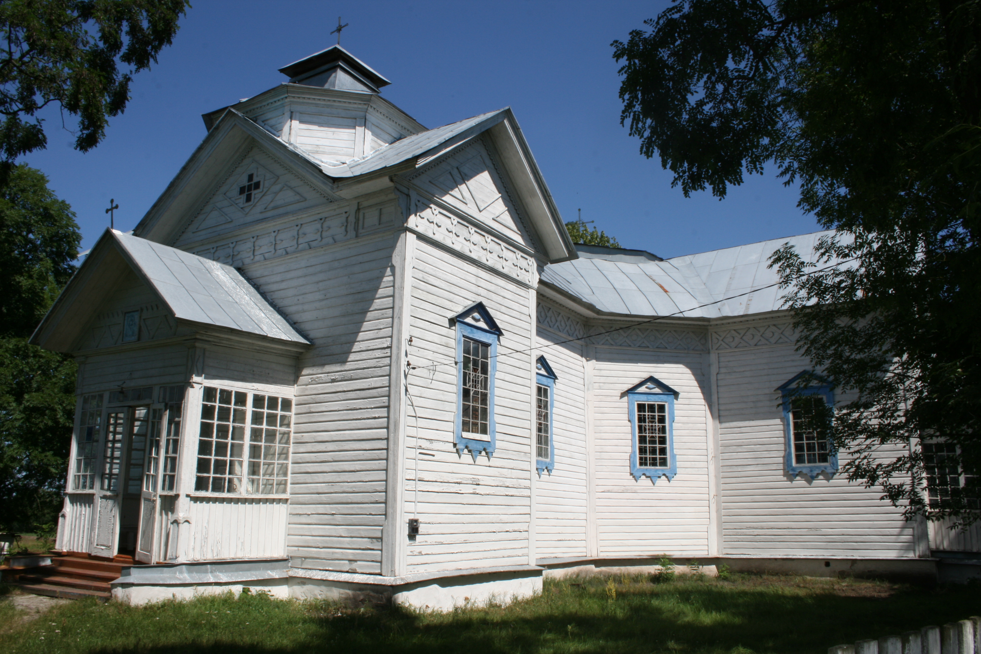 Церква Різдва Богородиці (дер.), село Вовчків